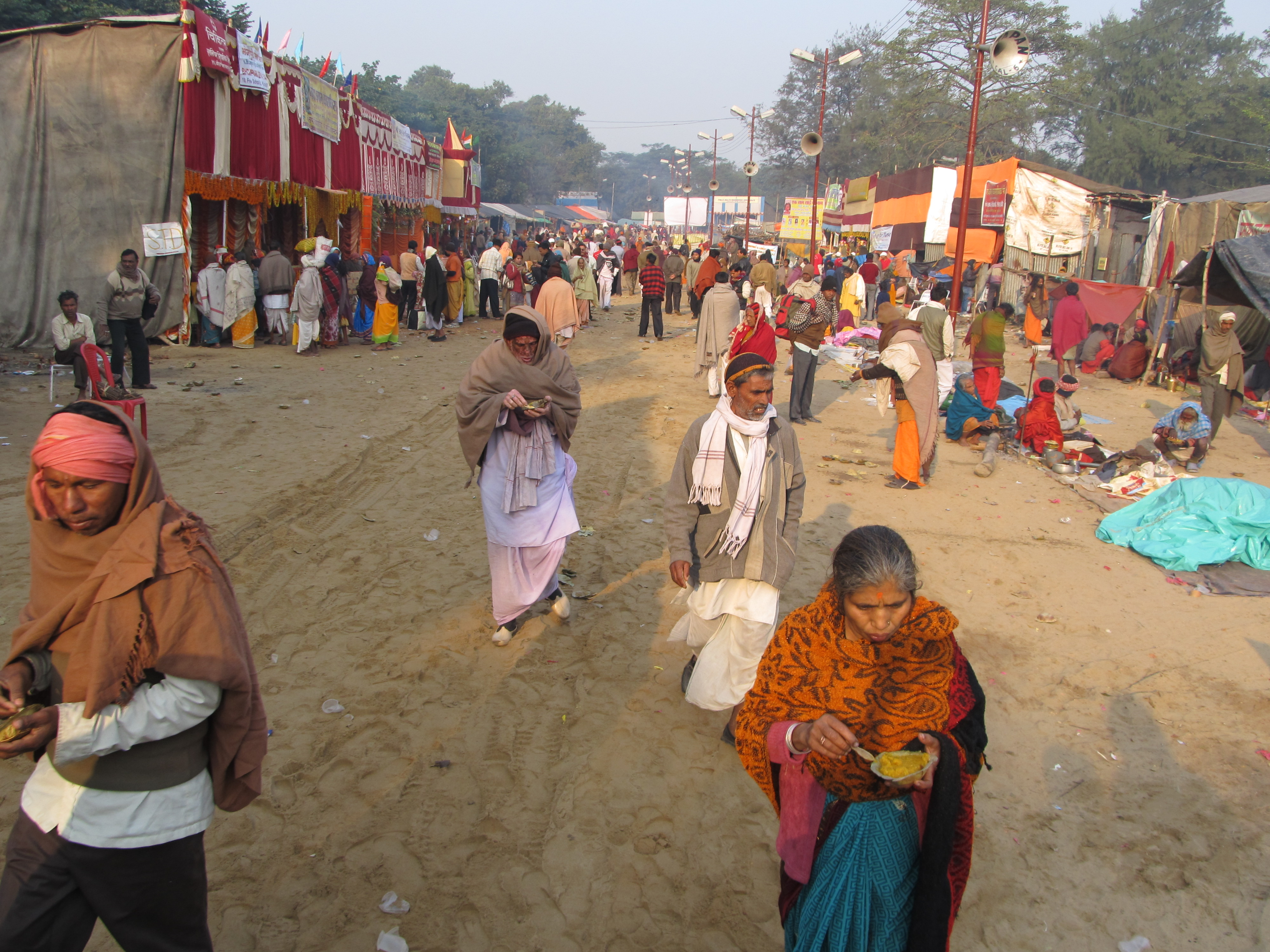 Photographed at Kolkata.